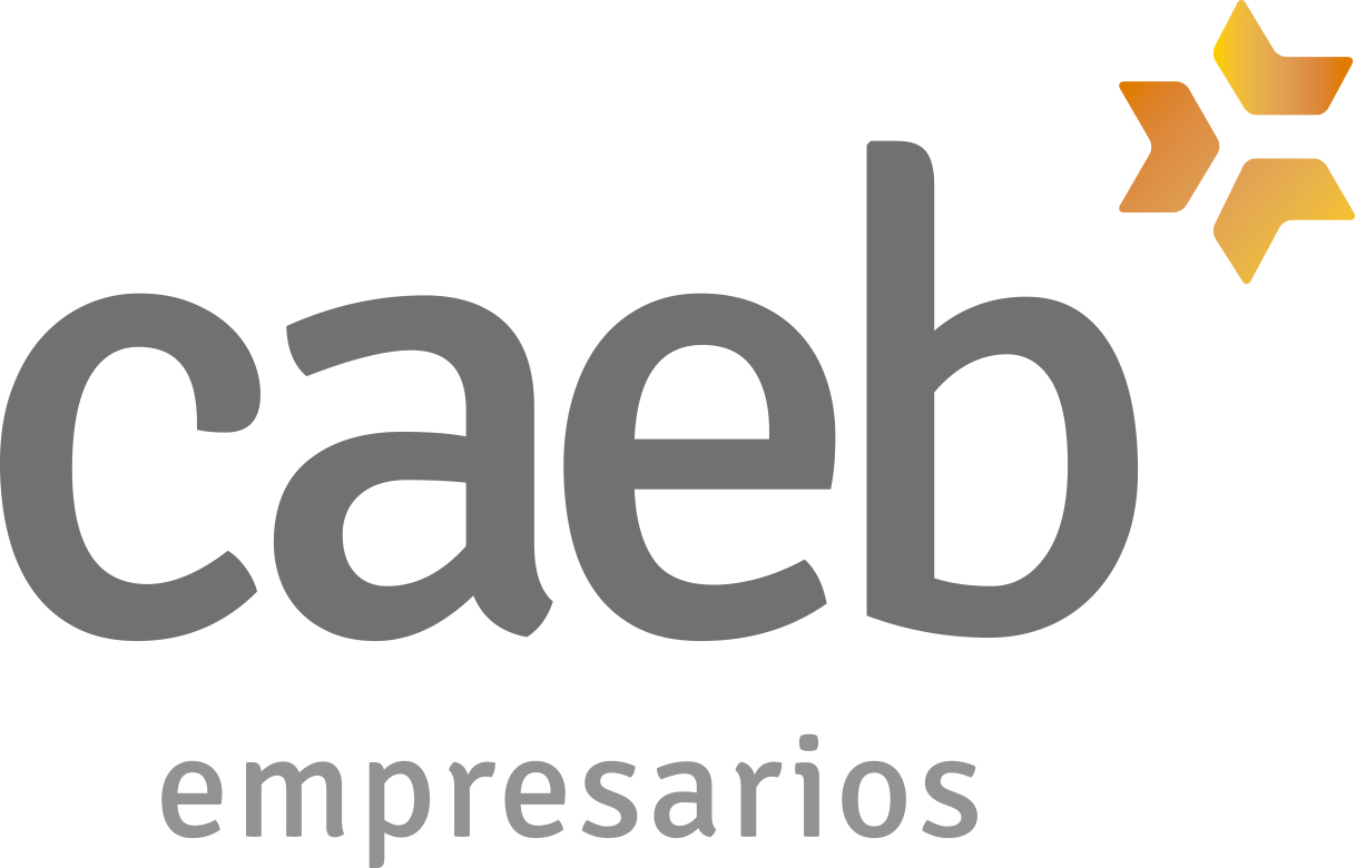 Logotipo de la Confederación de Asociaciones Empresariales de Baleares